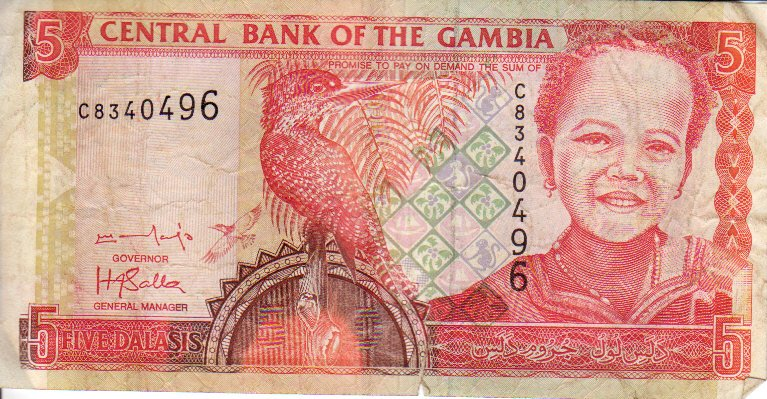 5 dalasi